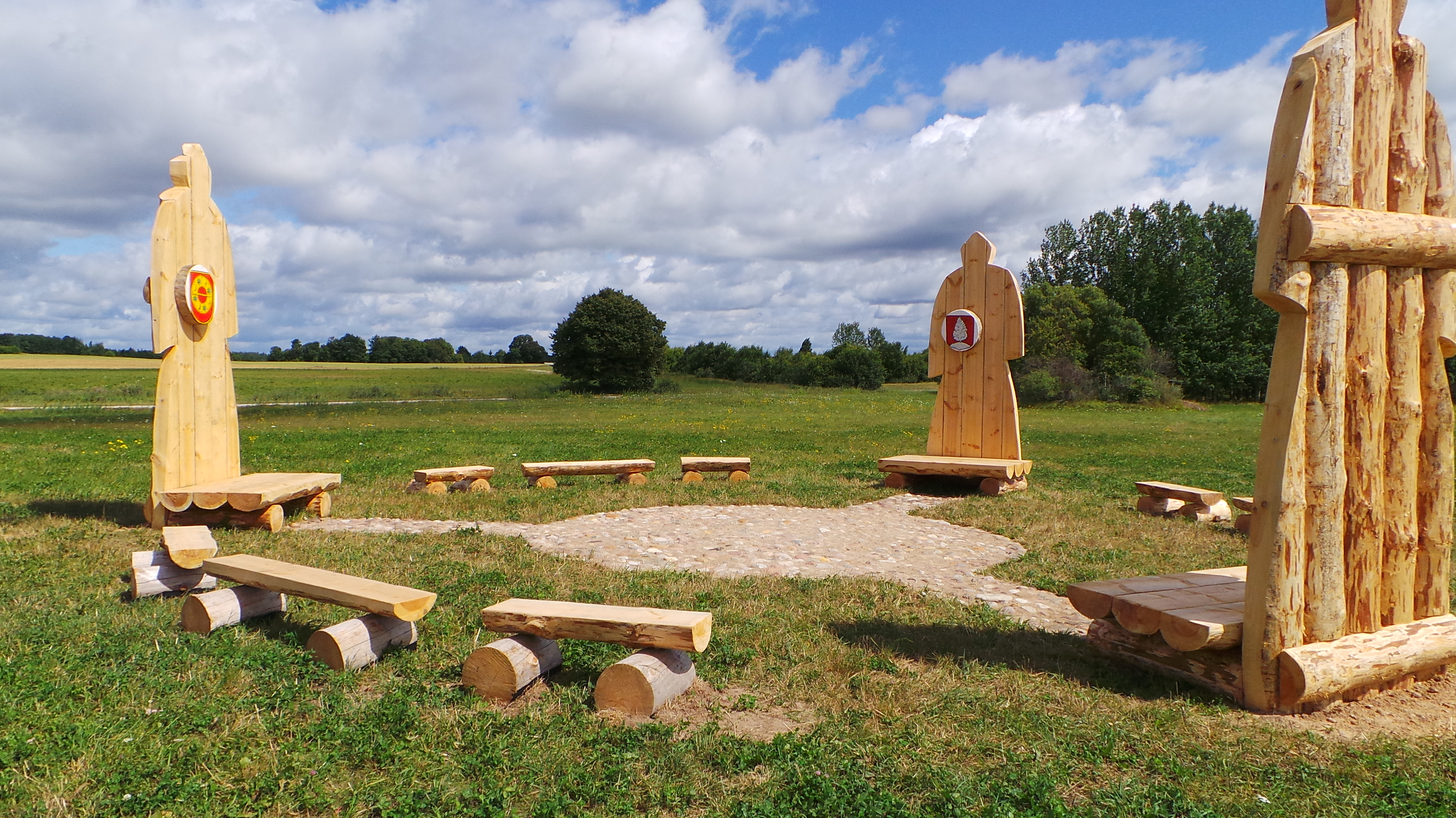 Suitu tikšanās vieta